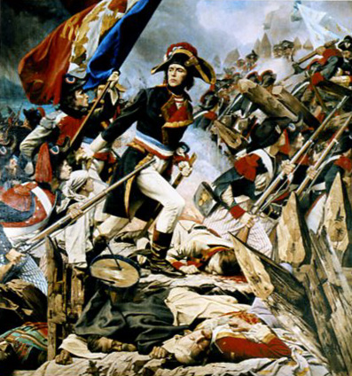 Le général Hoche à la bataille de Quiberon en 1795 (Hotel de ville de Versailles).